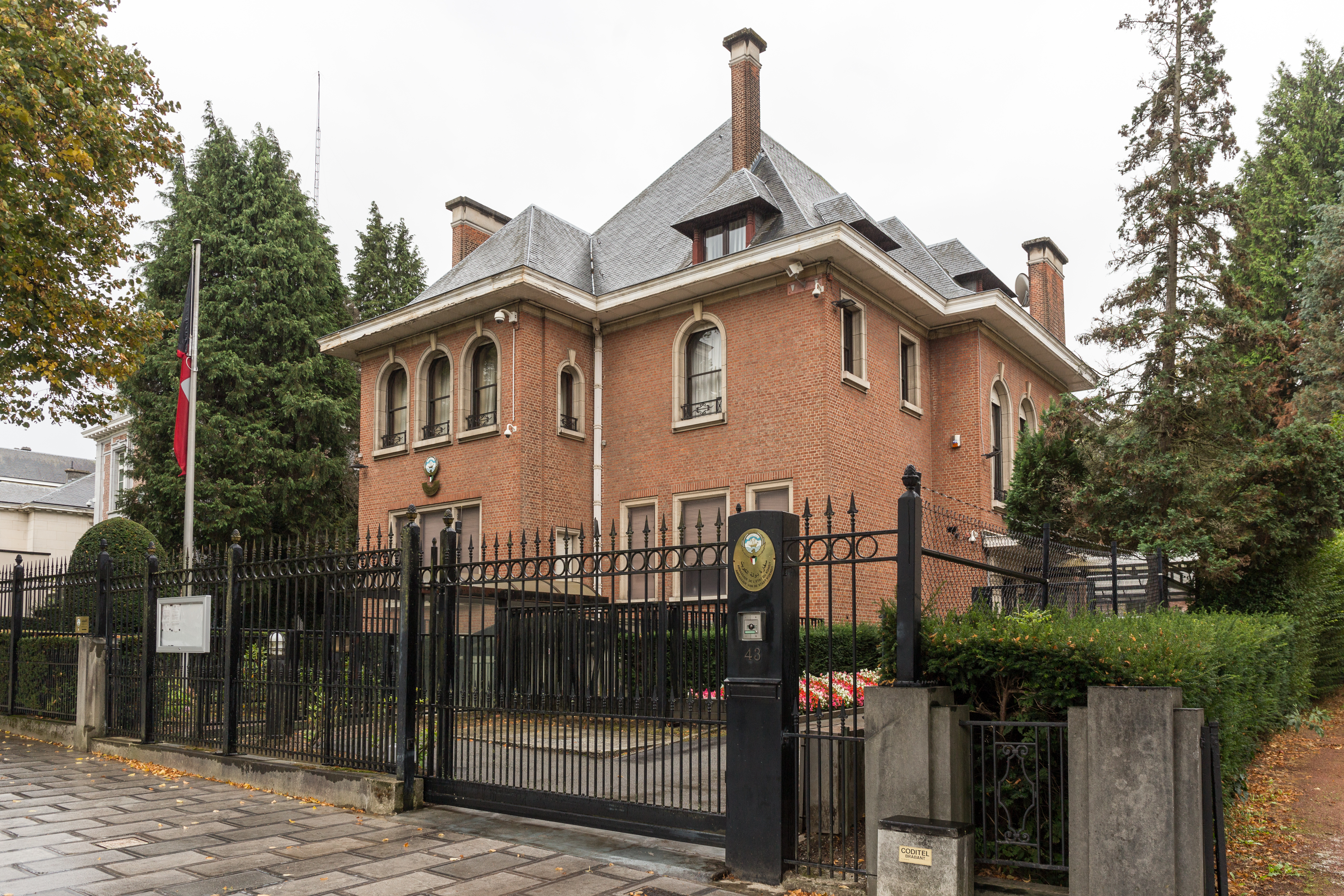 Ambassade du Koweït en Belgique, avenue Franklin Roosevelt 43 à Bruxelles.